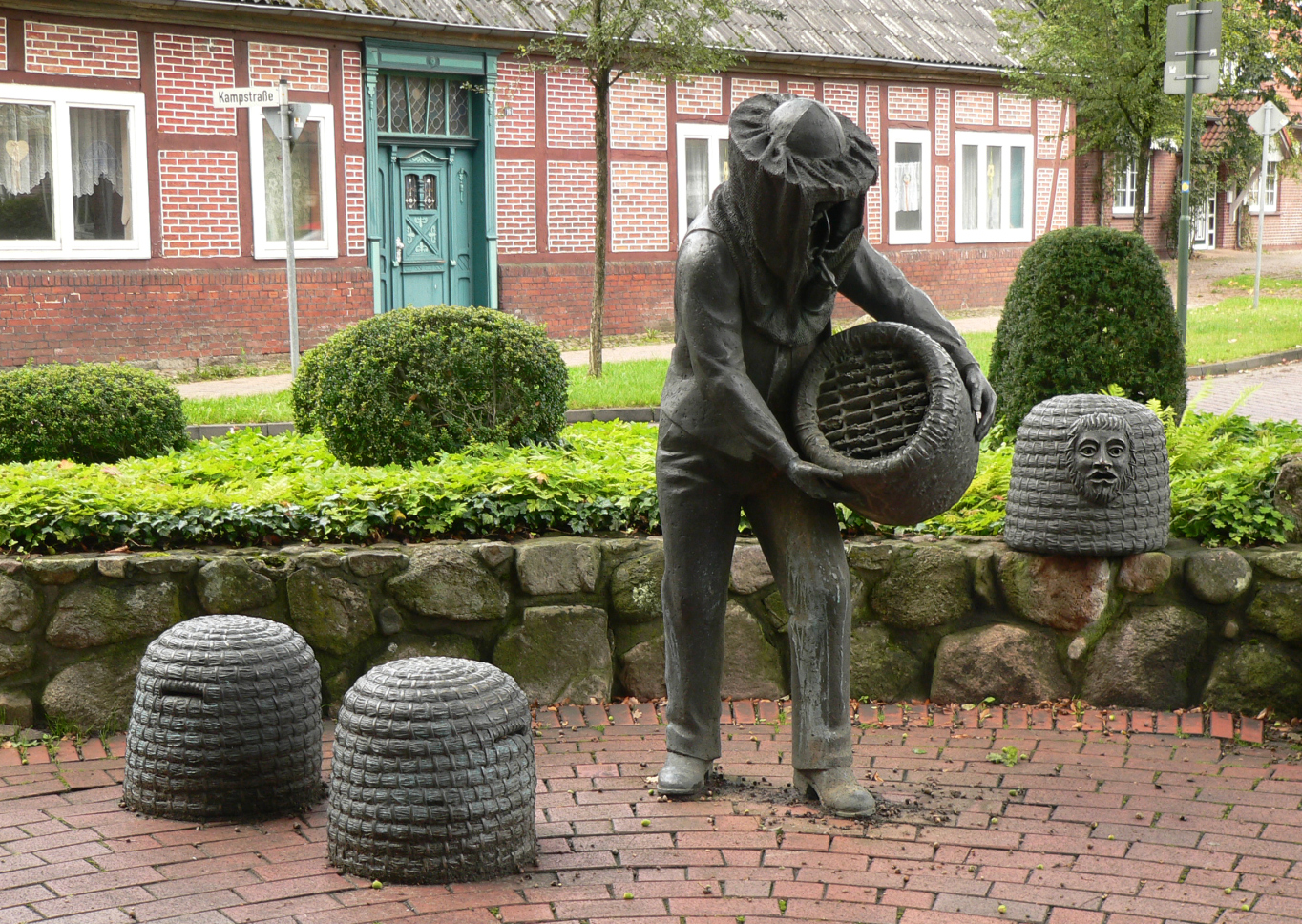 Der Wietzendorfer Imker, Figurengruppe aus Bronze, auf dem Kirchenvorplatz in Wietzendorf in Niedersachsen, Deutschland. Das Denkmal wurde 1996 von dem deutschen Bildhauer Claus Homfeld zur Erinnerung an den dort verbreiteten Berufsstand des Imkers und als Wahrzeichen des alljährlichen „Honigfestes“ geschaffen. Rechts, auf der Mauer stehend ist ein Bannkorb dargestellt.